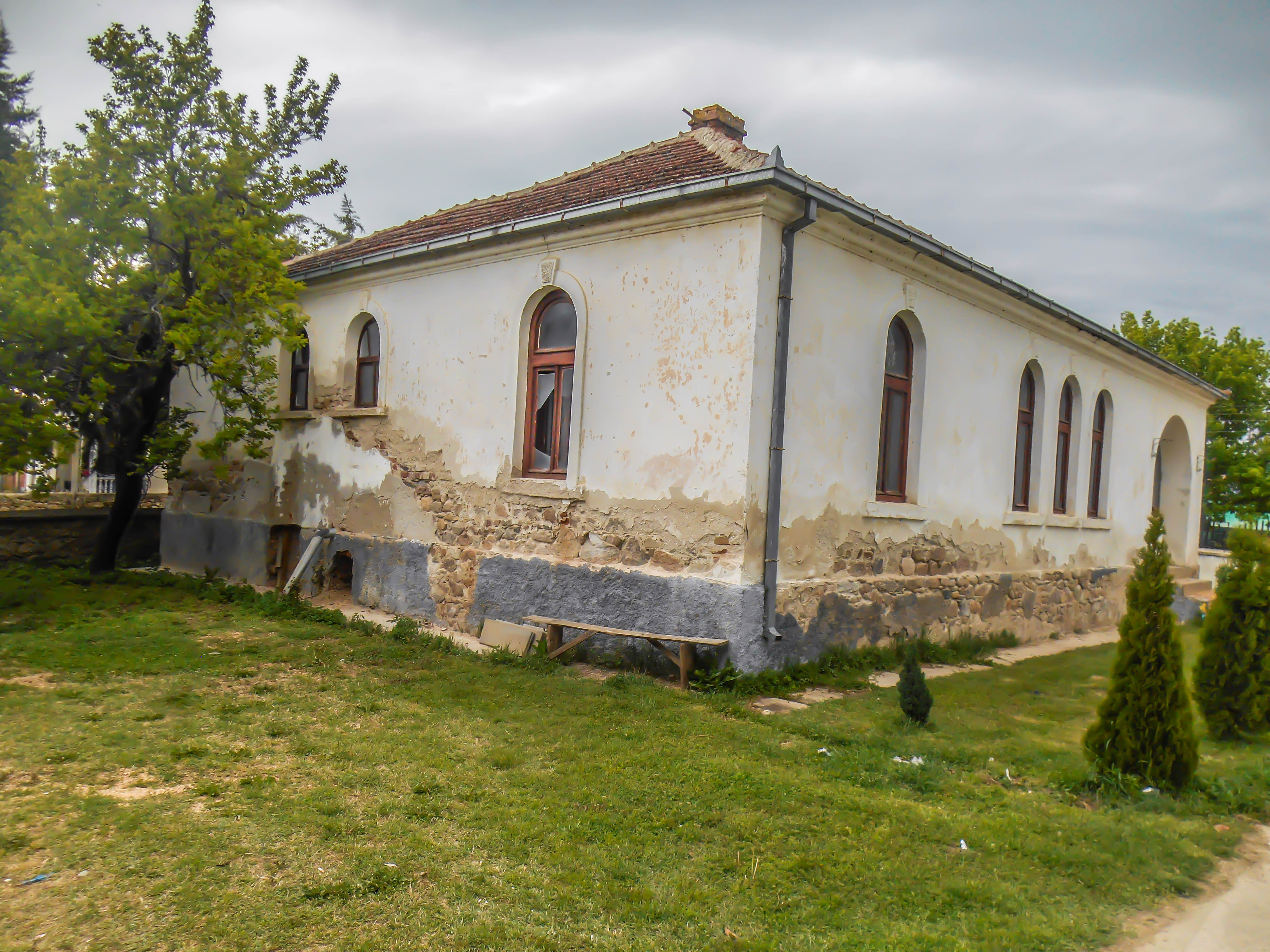 Куќа каде е основан првиот НОО во Струмичкиот регион - Моноспитово